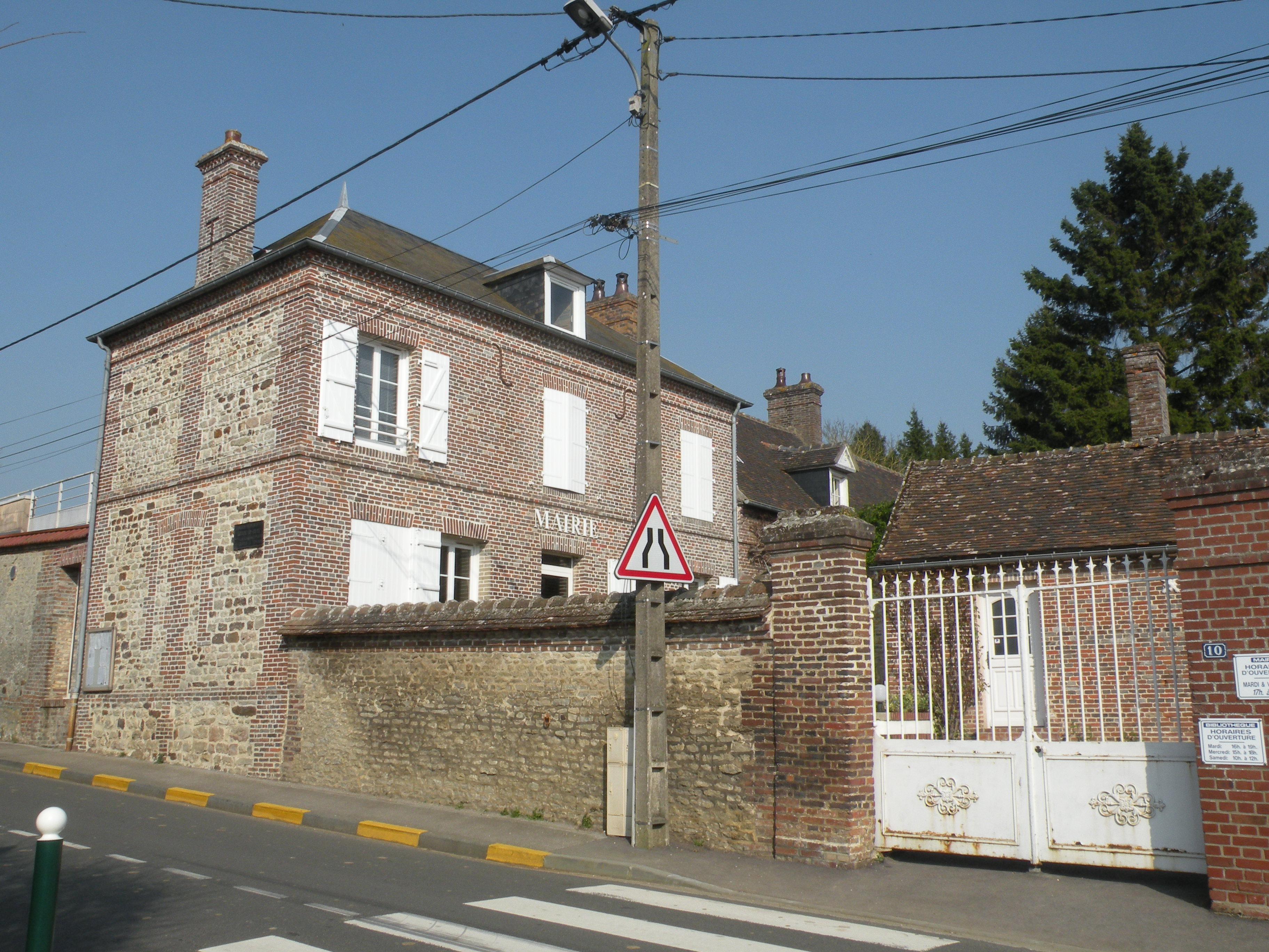 Hodenc-en-Bray mairie